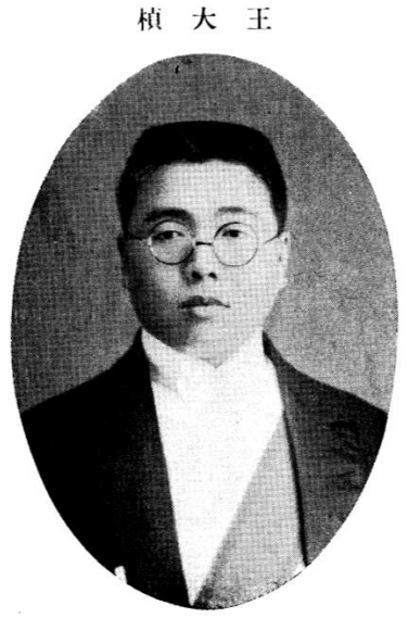 王大桢，摘自班鹏志《接收青岛纪念写真》